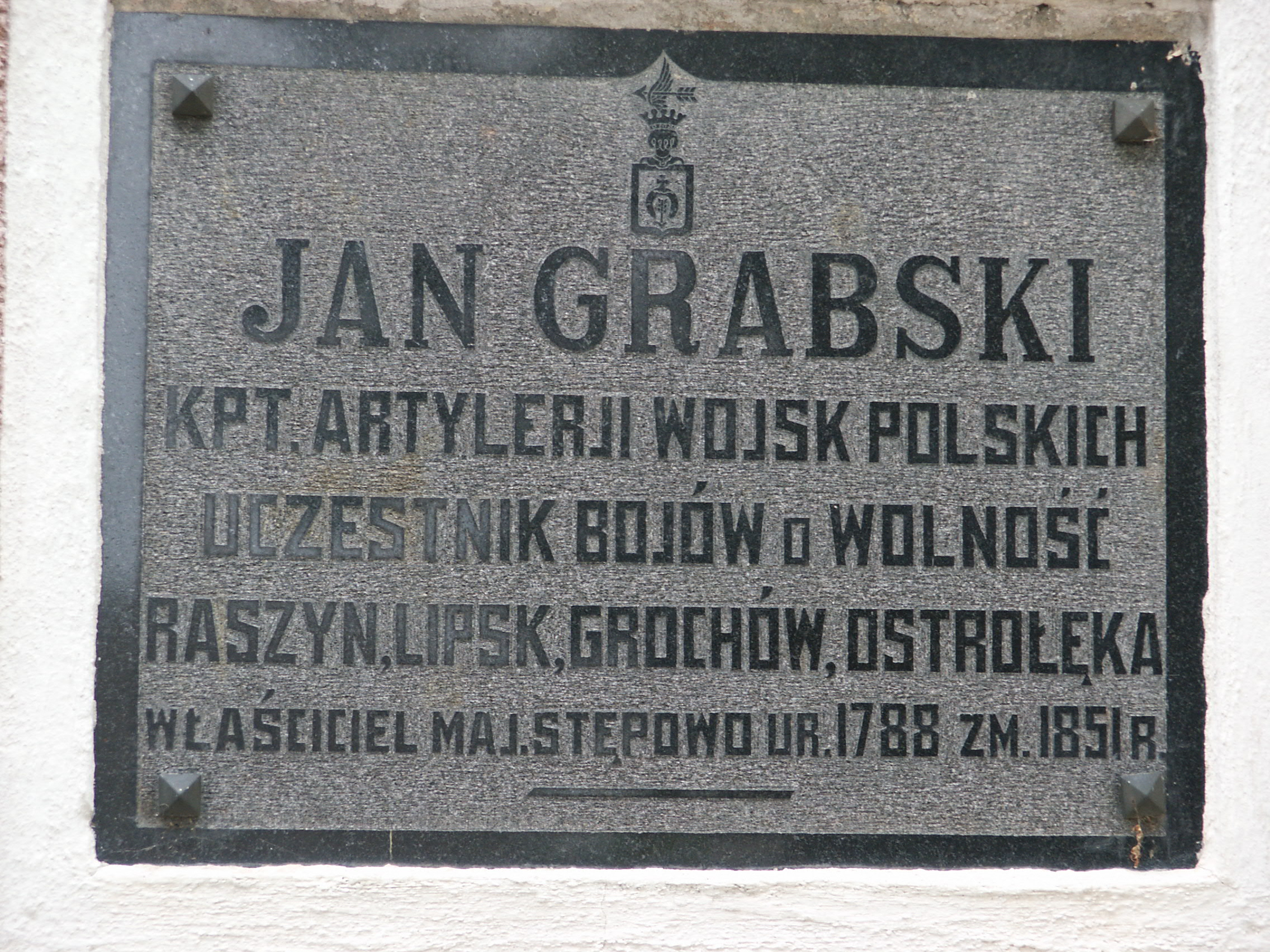 Tablica na kosciele w Sadłowie. Dotyczy Jana Grabskiego.